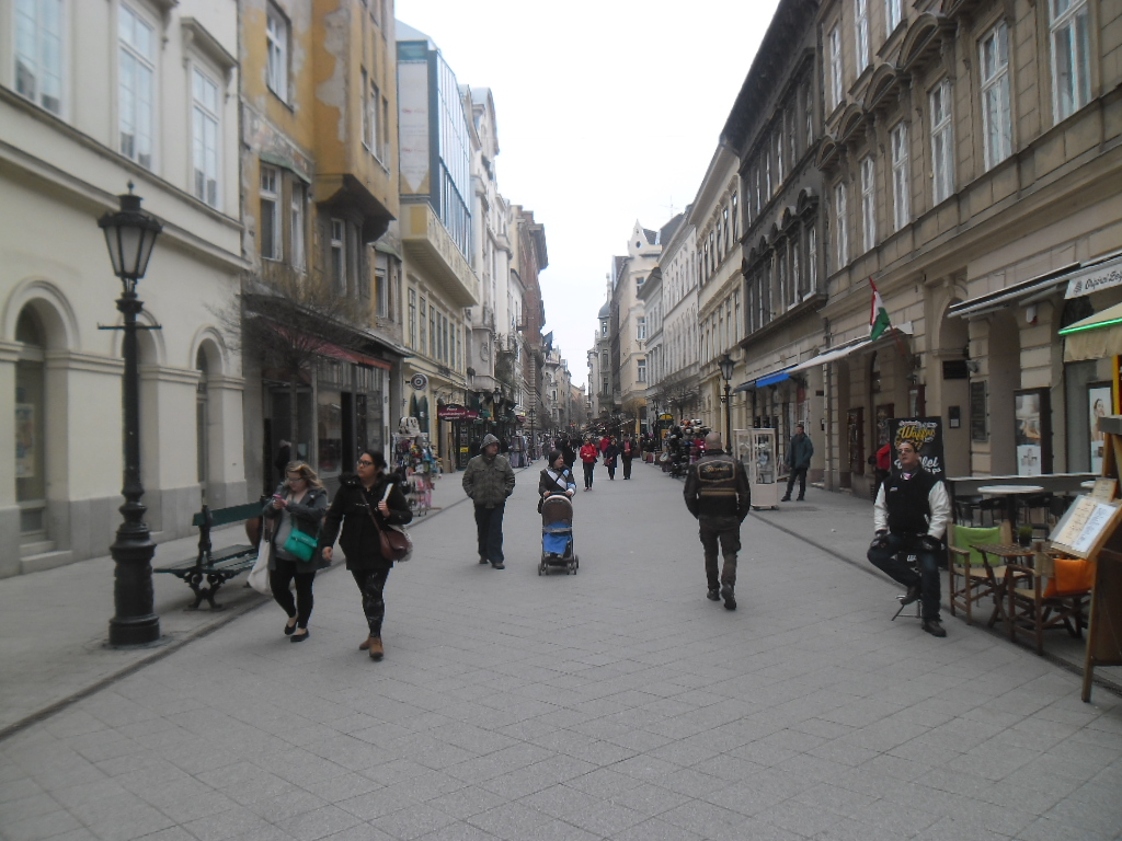 Budimpešta, Mađarska